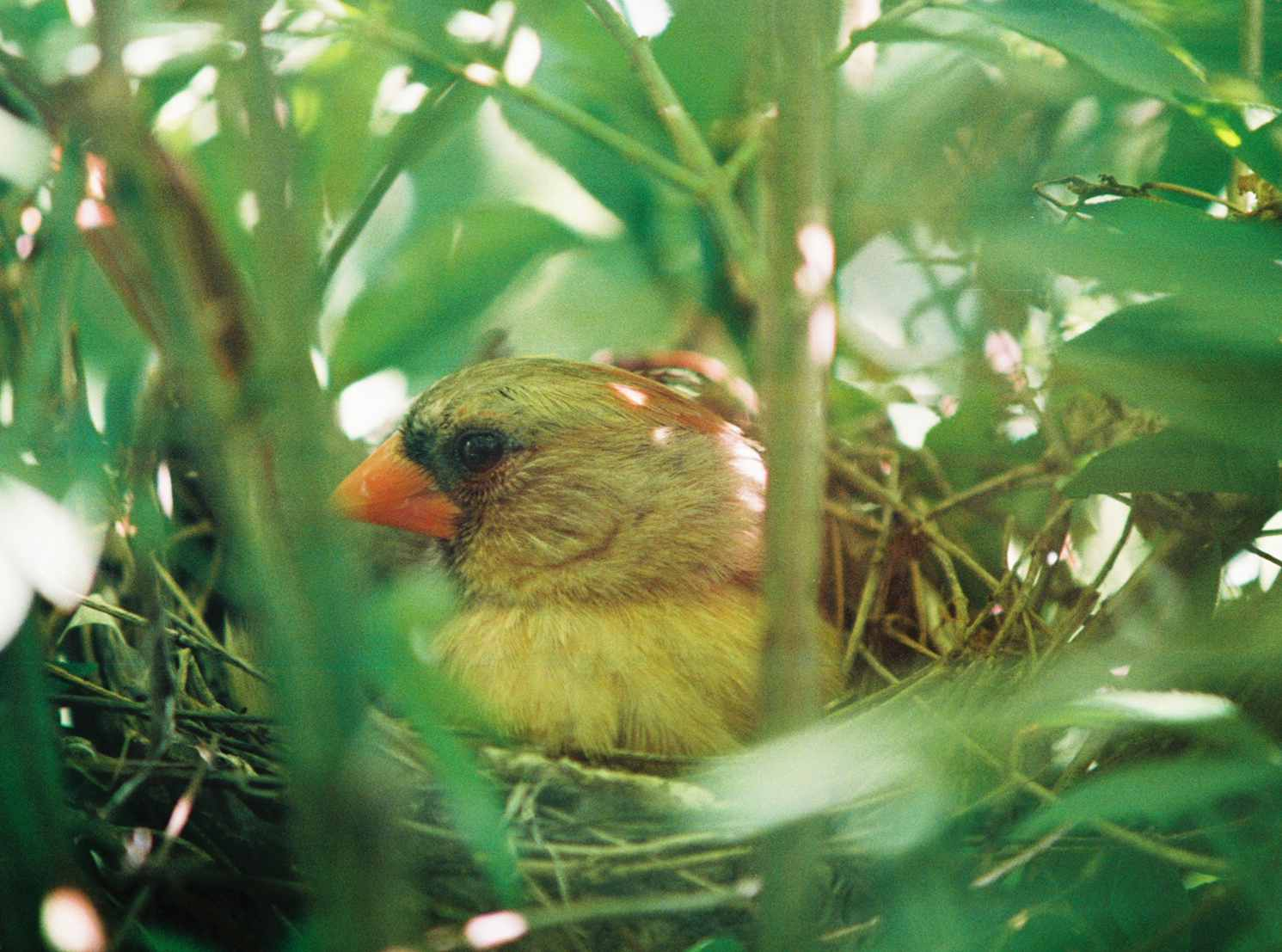 Cardinal in nest